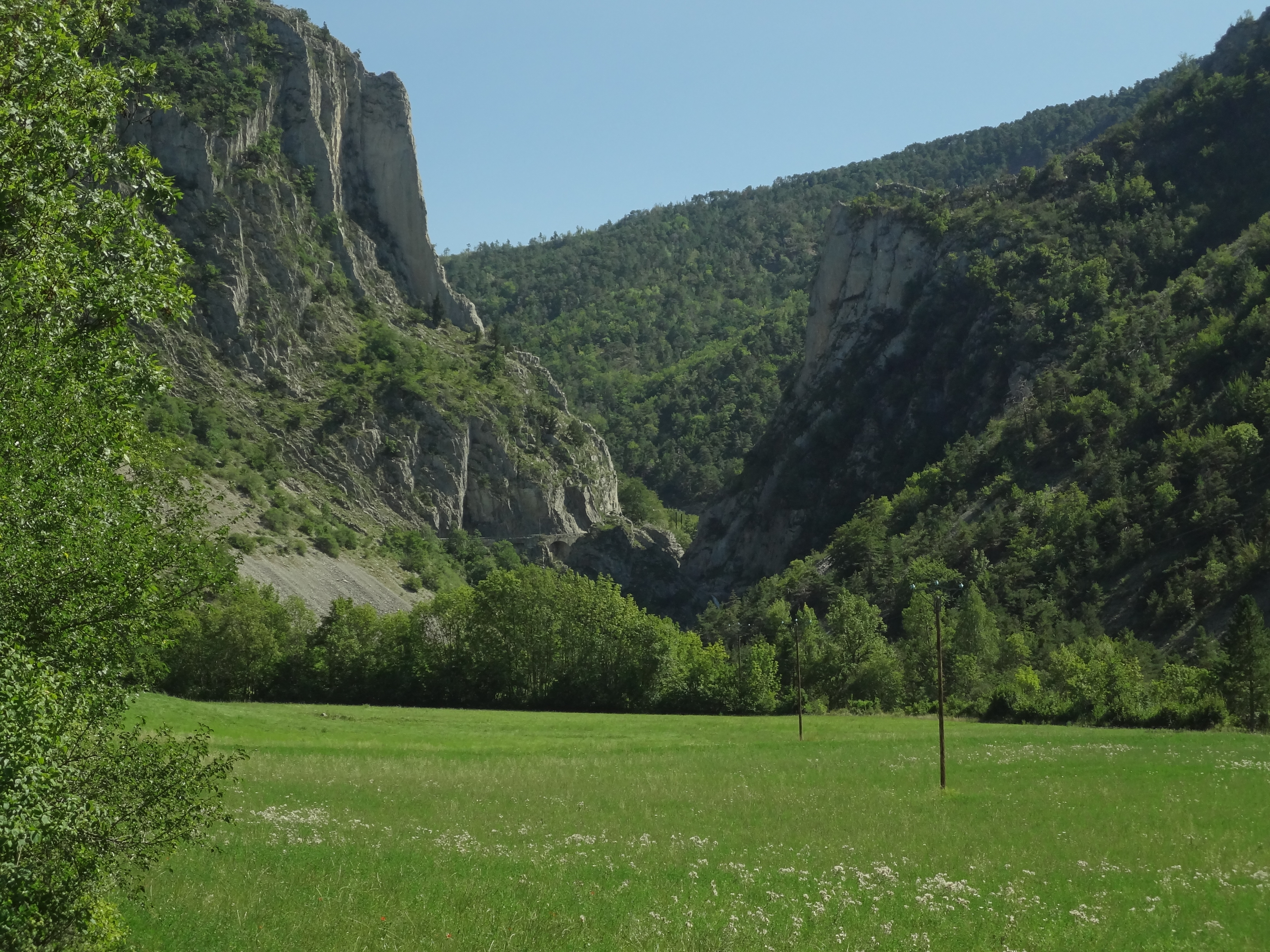 La route menant à Esparron-la-Bâtie passe au milieu.